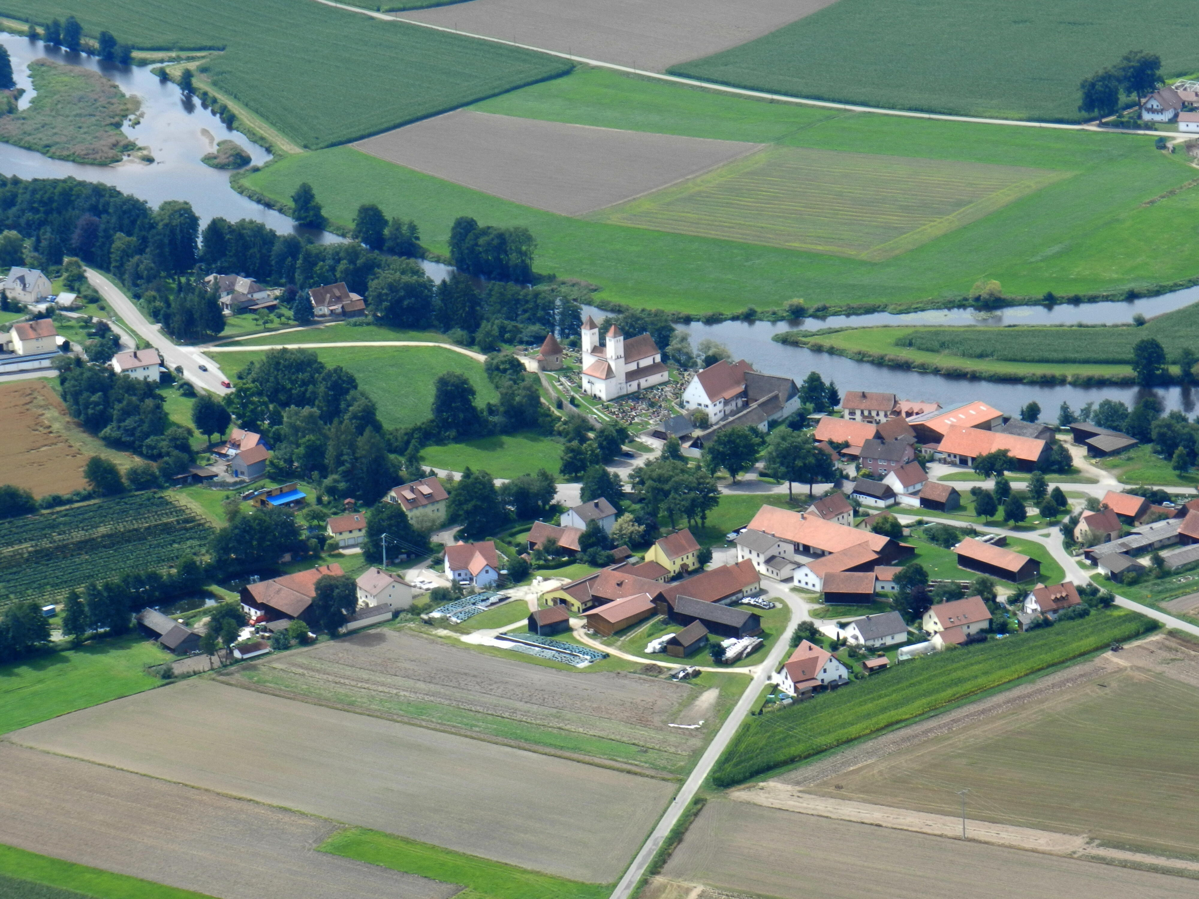 Perschen bei Nabburg, Landkreis Schwandorf, Oberpfalz, Bayern (14. August 2011) Perschen mit der Kirche Peter und Paul und dem Edelmannshof (Museum) am Fluss Naab. Perschen war ein zentraler kirchlicher Mittelpunkt an der Naab bei der Besiedlung dieser Gegend. Die Stadt Nabburg erhielt erst in späterer Zeit ihre Bedeutung als Handelsplatz.